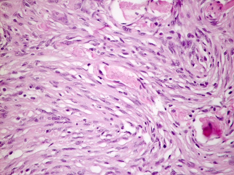 Fibromatöses Meningeom, selbst fotografiert